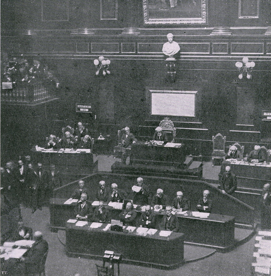 Salandra legge il suo discorso al Senato